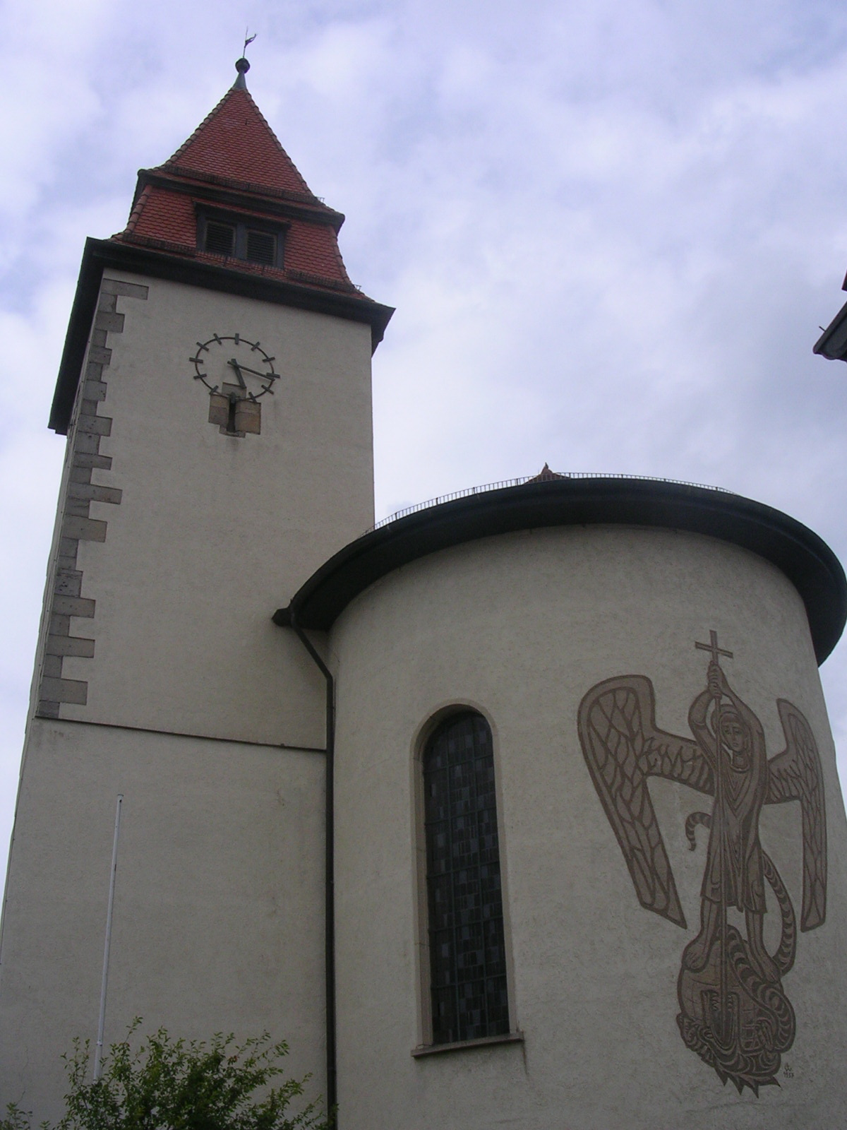 Pfarrkirche St. Briccius zu Wurmlingen, selbst fotografiert am 06.08.2005 von User Alphacentauri